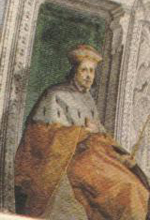 Dipinto del doge Antoniotto Adorno